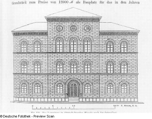 Das Logenhaus in Altstadt-Dresden (Façade nach der Ostraallee), Fig. 138